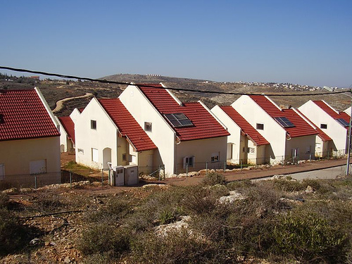 שכונת 'בתי אמנה'